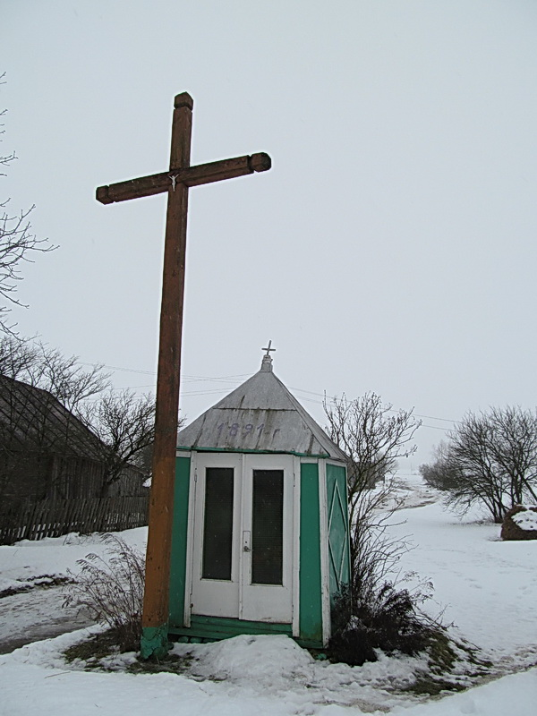 Бачэшнікі. Крыж з каплічкай